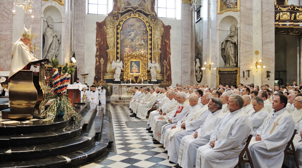 Krizmena maša 2017